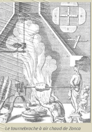 Tournebroche à air chaud accompagné, en haut à droite, d'un détail de la roue à ailettes.